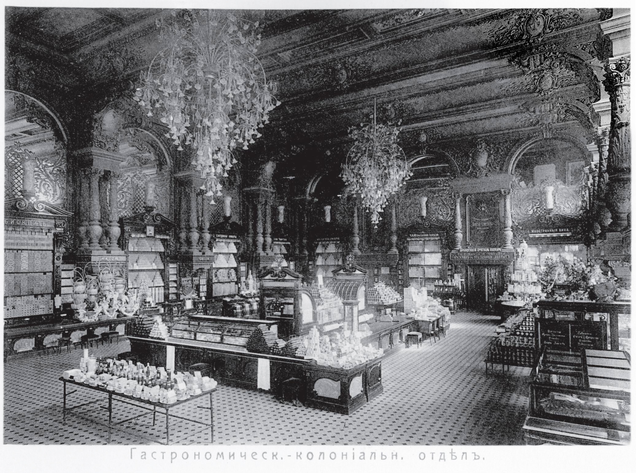 Магазин Елисеева и погреба русских и иностранных вин. Колониальный отдел